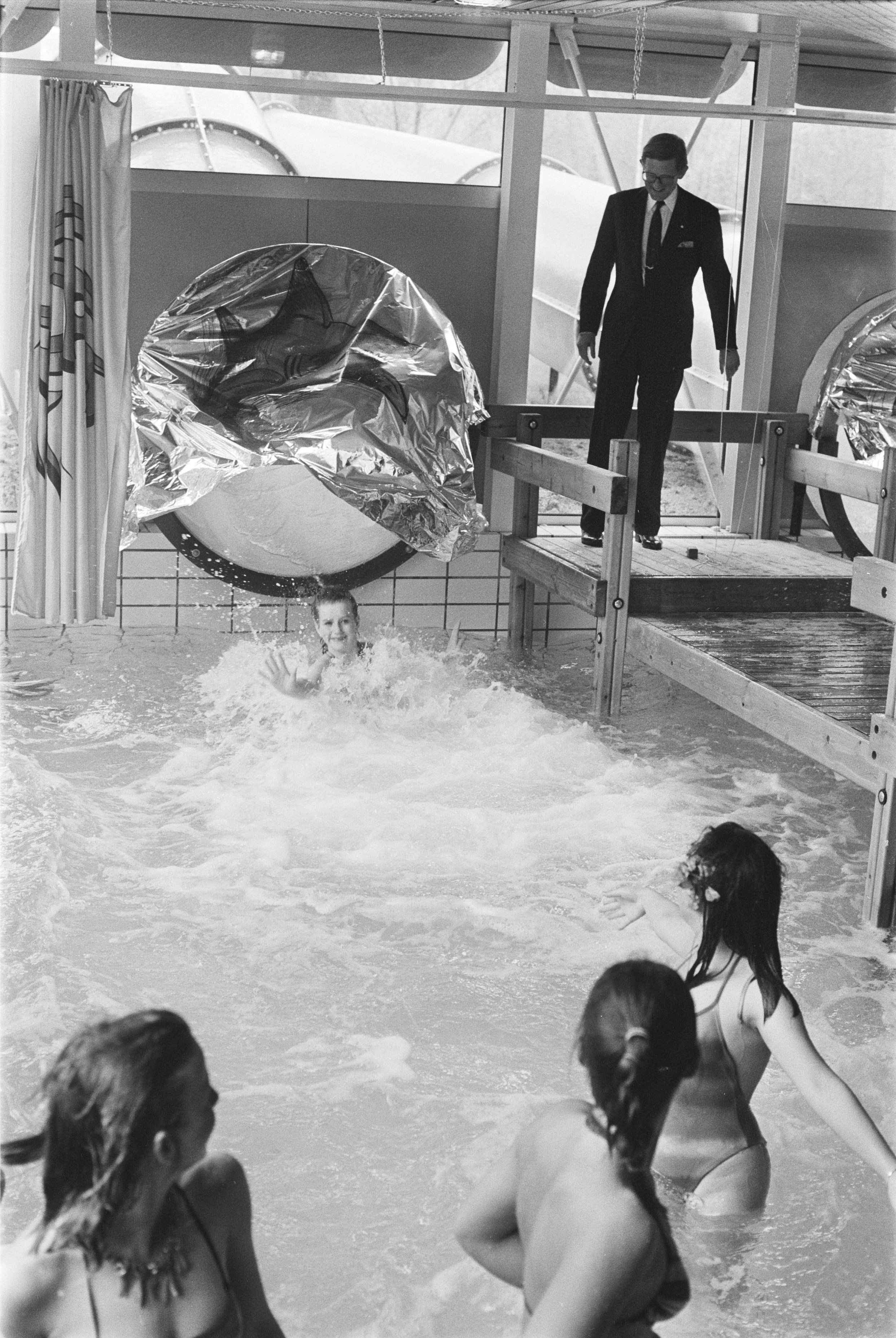 Collectie / Archief : Fotocollectie Anefo Reportage / Serie : [ onbekend ] Beschrijving : P. van Vollenhoven opende Tiki-golfbad in pretpark Duinrell; dir. pretpark Duinrell Datum : 19 april 1984 Persoonsnaam : Vollenhoven, Pieter van Instellingsnaam : Duinrell Fotograaf : Croes, Rob C. / Anefo Auteursrechthebbende : Nationaal Archief Materiaalsoort : Negatief (zwart/wit) Nummer archiefinventaris : bekijk toegang 2.24.01.05 Bestanddeelnummer : 932-9395